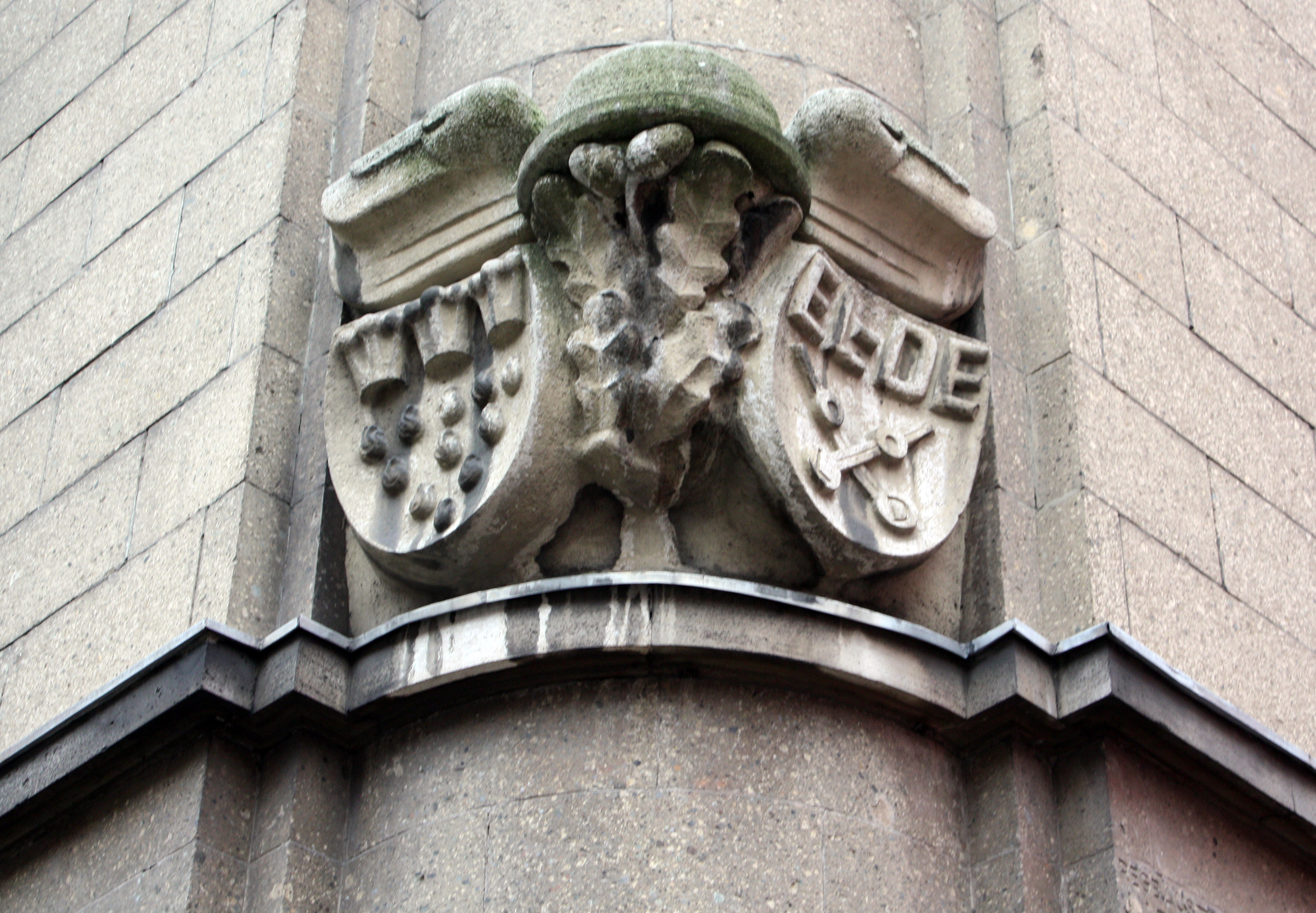 Wappen-EL-DE-Haus-Köln